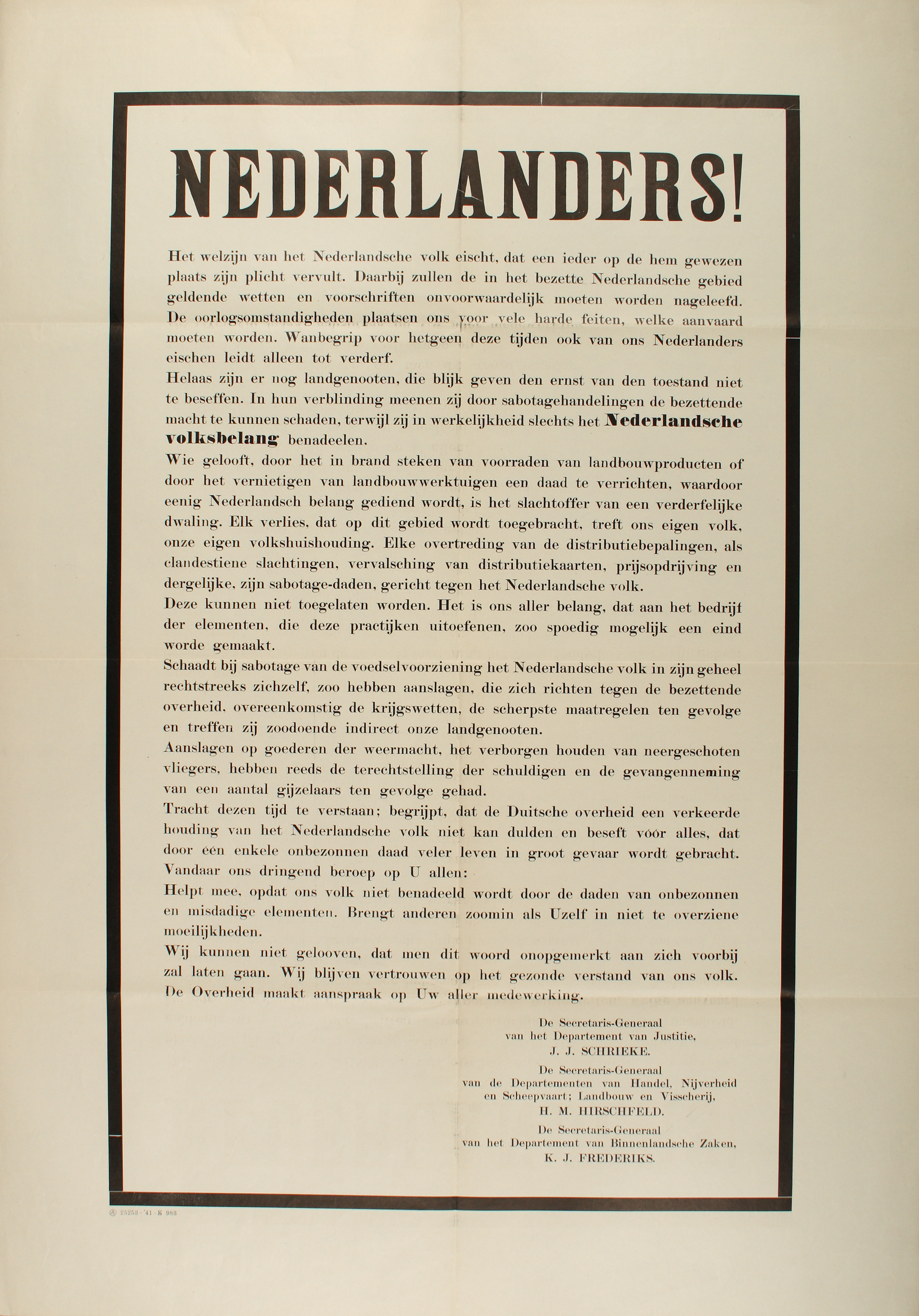 Nederlanders! Dit letteraffiche roept op om de Duitse bezetter medewerking te verlenen en de door de Duitsers opgestelde wetten plichtmatig na te leven.